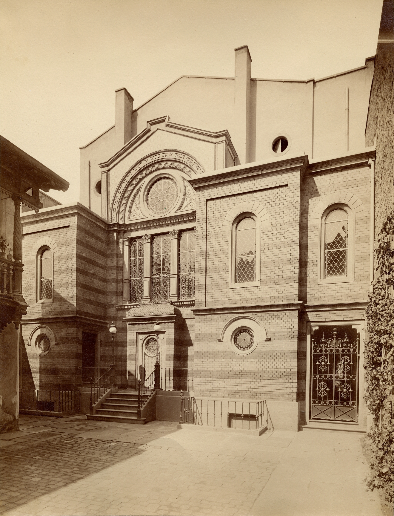 Synagoge der orthodoxen Israelitischen Religionsgesellschaft Karlsruhe, Karl-Friedrich-Straße 16, Rückgebäude, wohl um 1900. Erbaut von Gustav Ziegler 1881; 1938 zerstört.